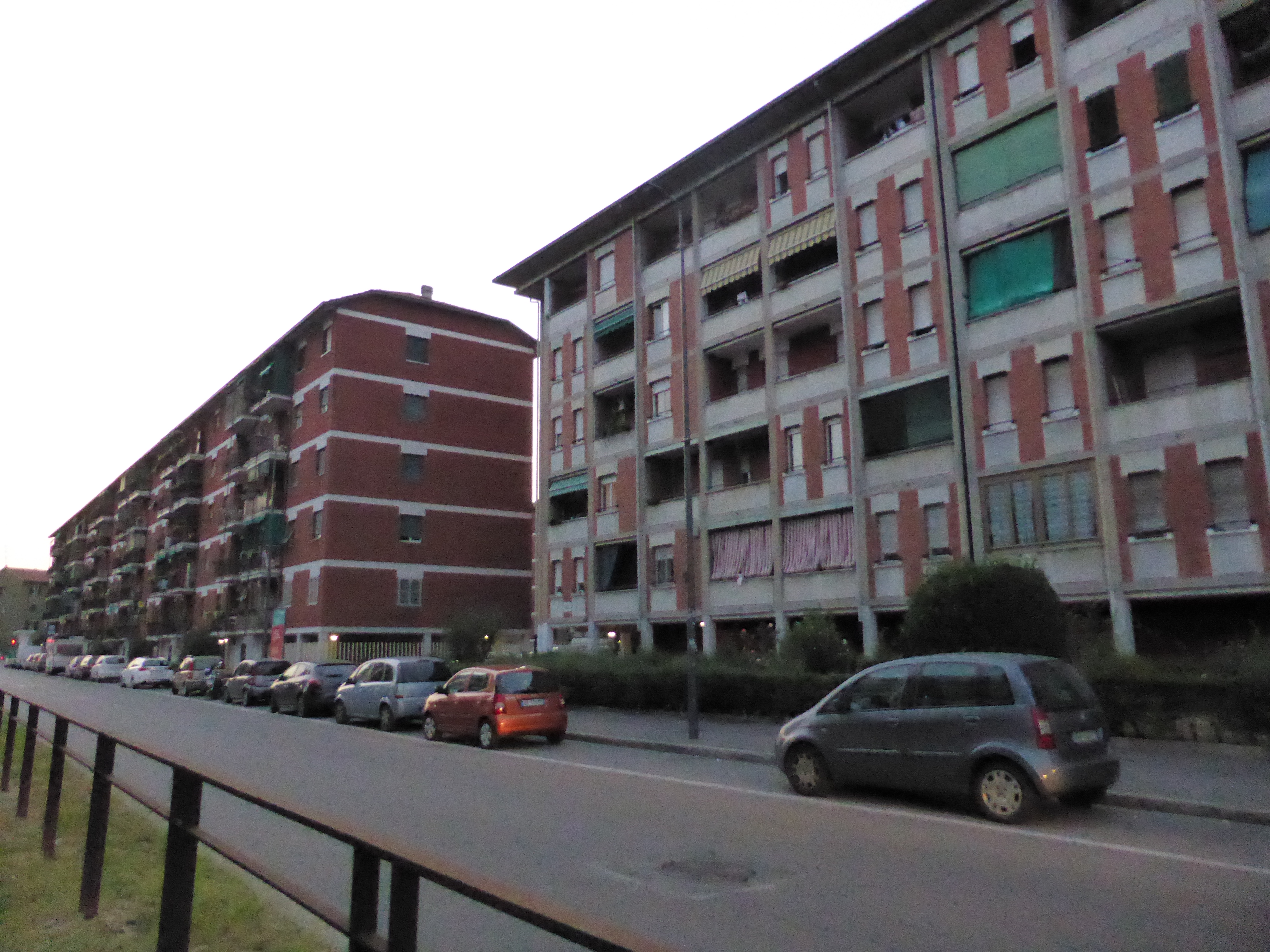 Quarto Oggiaro, Milano.